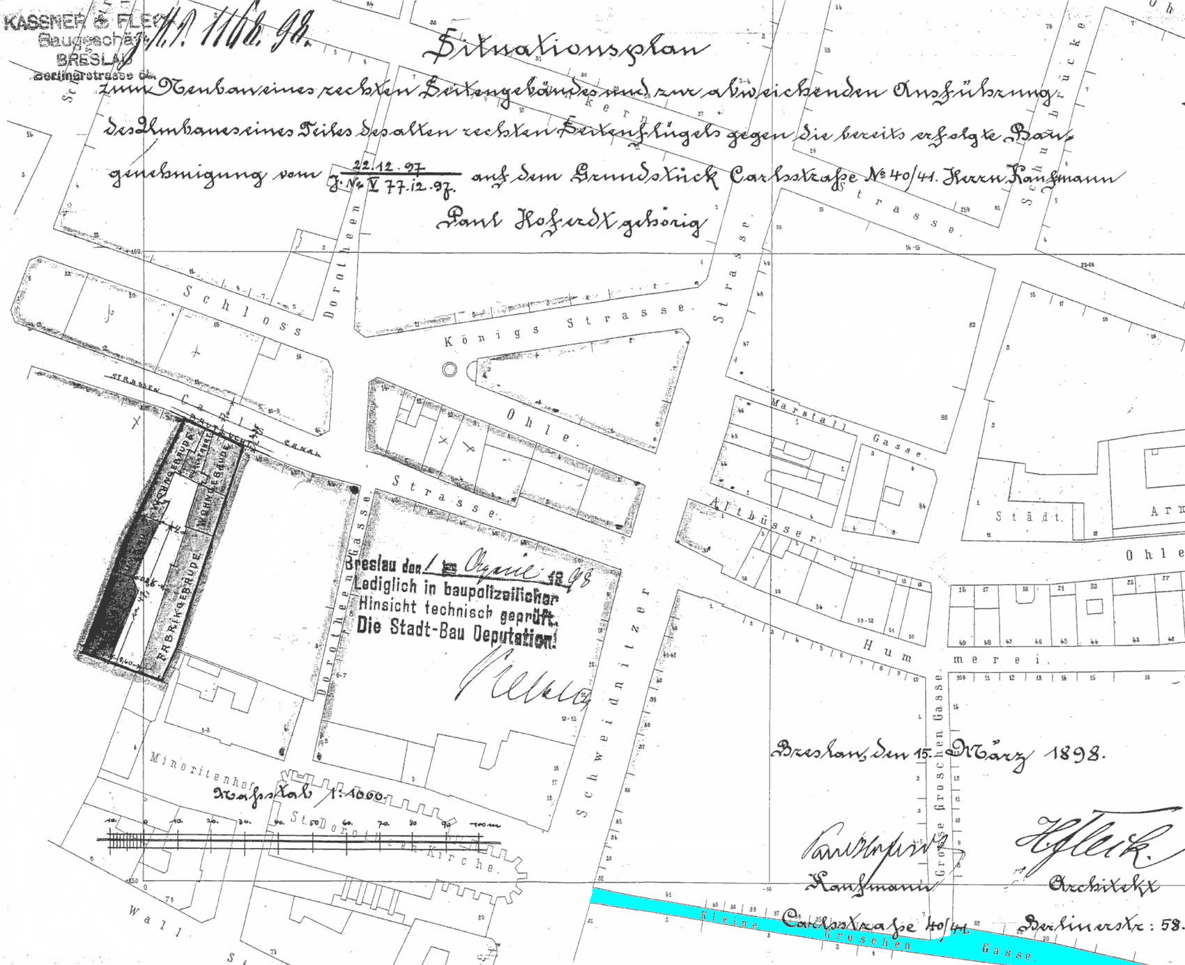 mapka fragmentu Wrocławia z 1898 r. z zaznaczoną na niebiesko Kleine Groschen Gasse - dzisiejszą ul. Menniczą